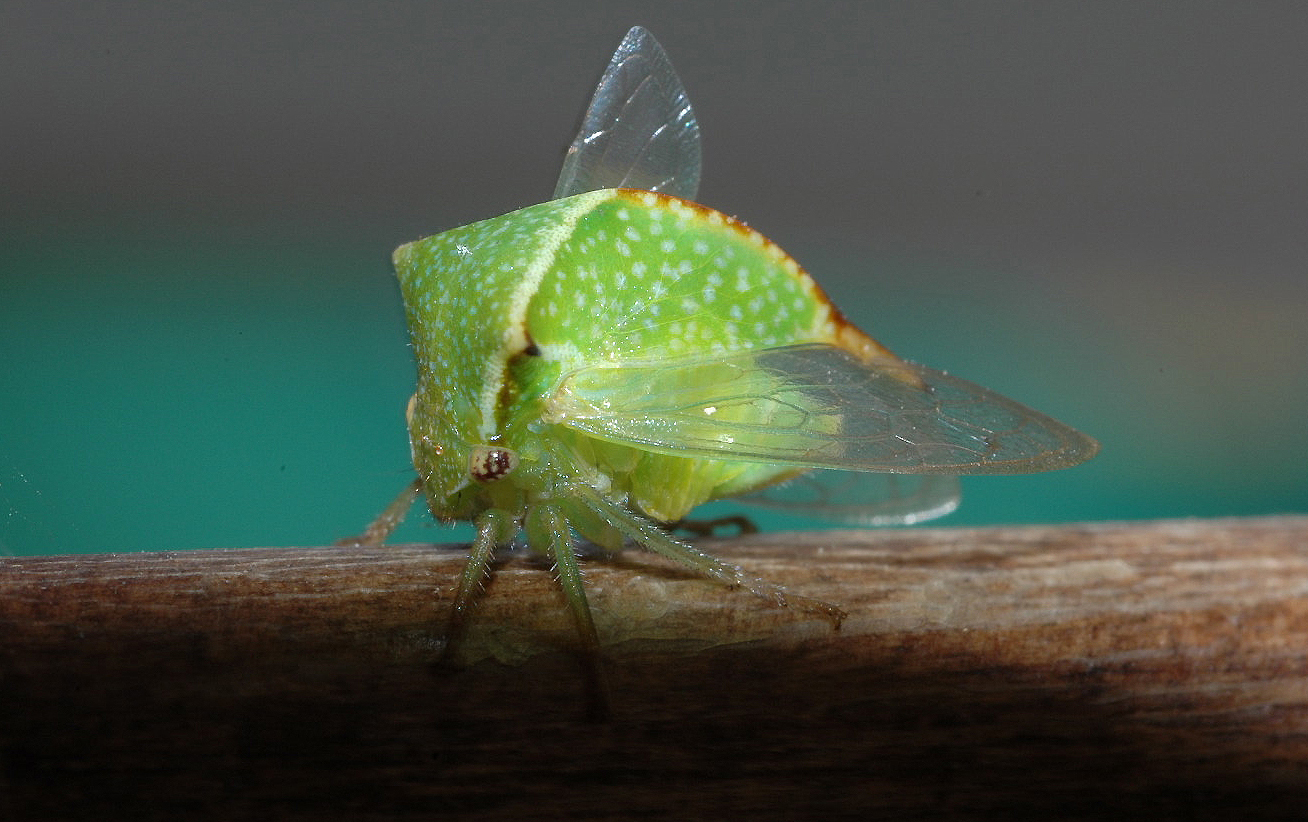 Stictocephala bisonia - Pays basque : 43° 20' 51.13" N - 01° 31' 05.91" O